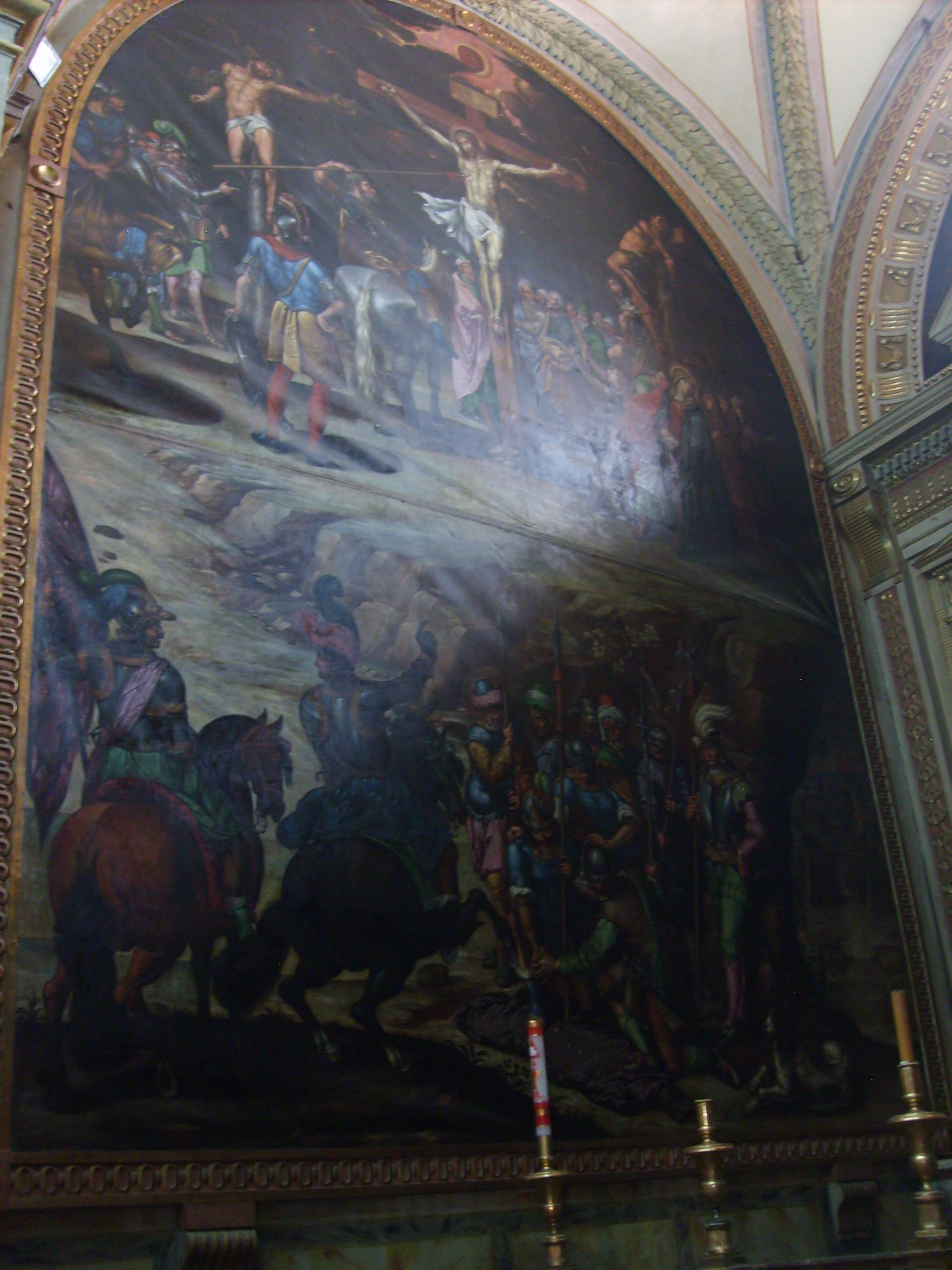 Pintura mural de la Crucificción de Cristo en la capilla de la Virgen de la Soledad en la Catedral de Puebla, atribuida por una parte a Antonio de Santander o a Diego de la Piedra.